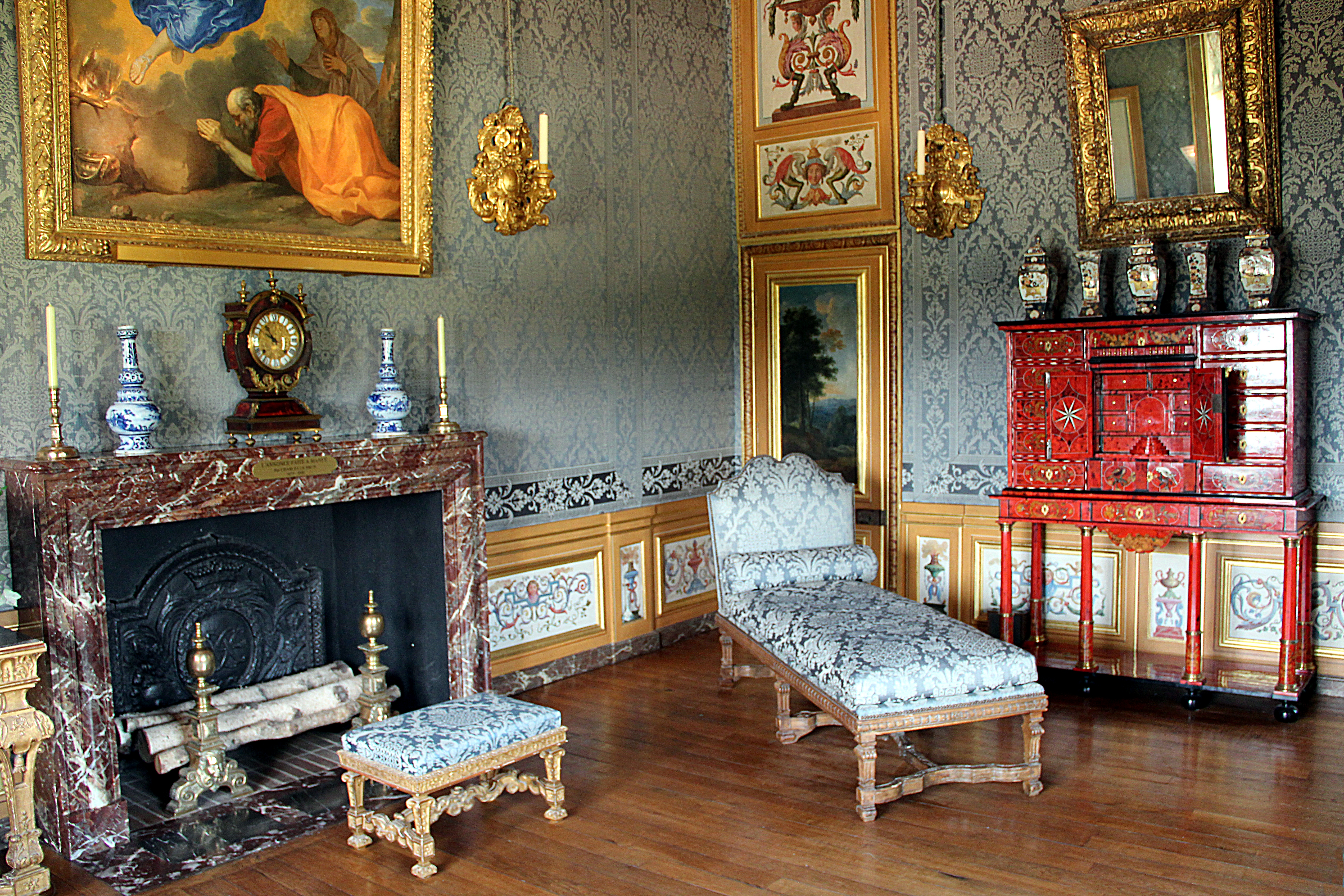 Cabinet de madame Fouquet - Château de Vaux-le-Vicomte - Maincy (Seine-et-Marne, France).